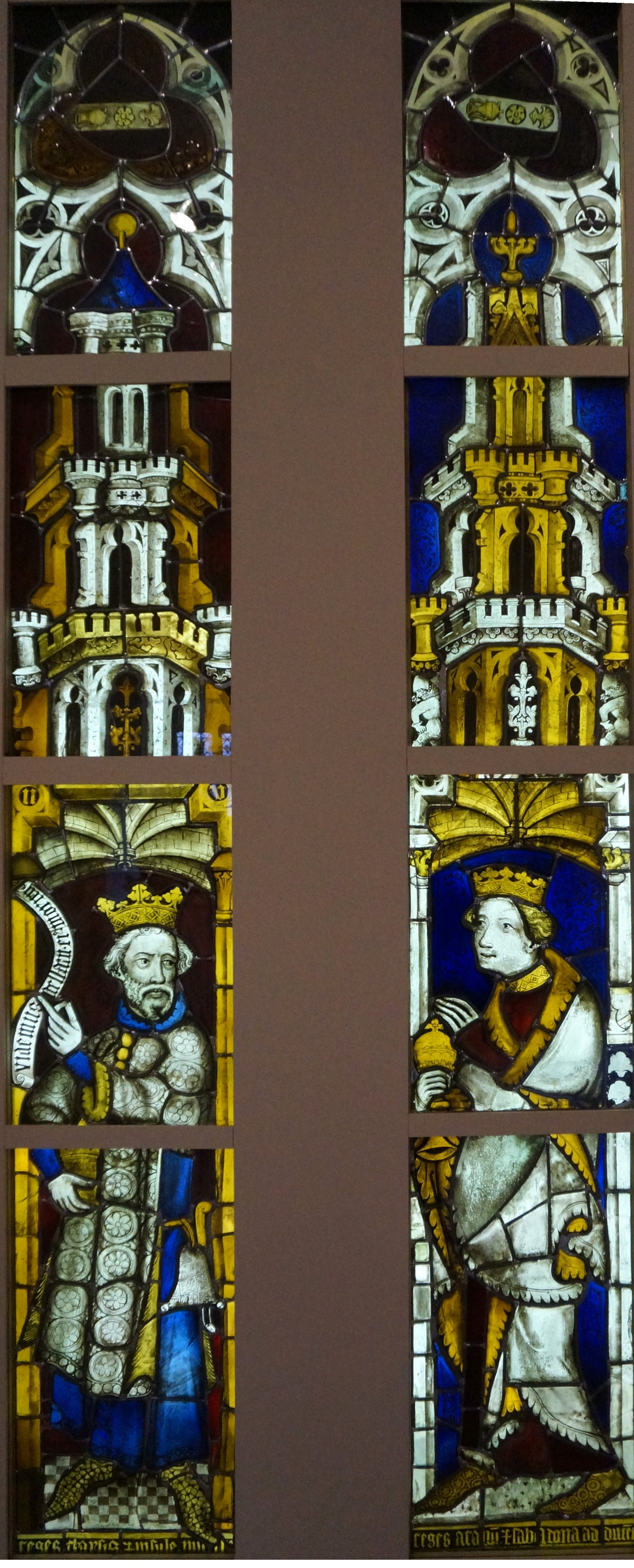 Vitrail de l'Adoration_des_rois_mages de 1390 par Hermann von Münster, provenant de l'église Saint-Ségolène de Metz[1][2].